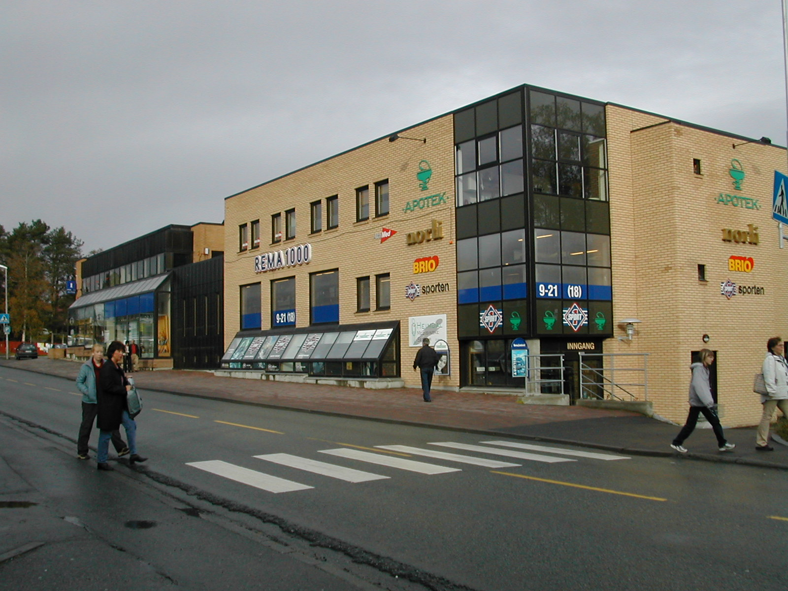 Rema-senteret på Heimdal, oktober 2001.